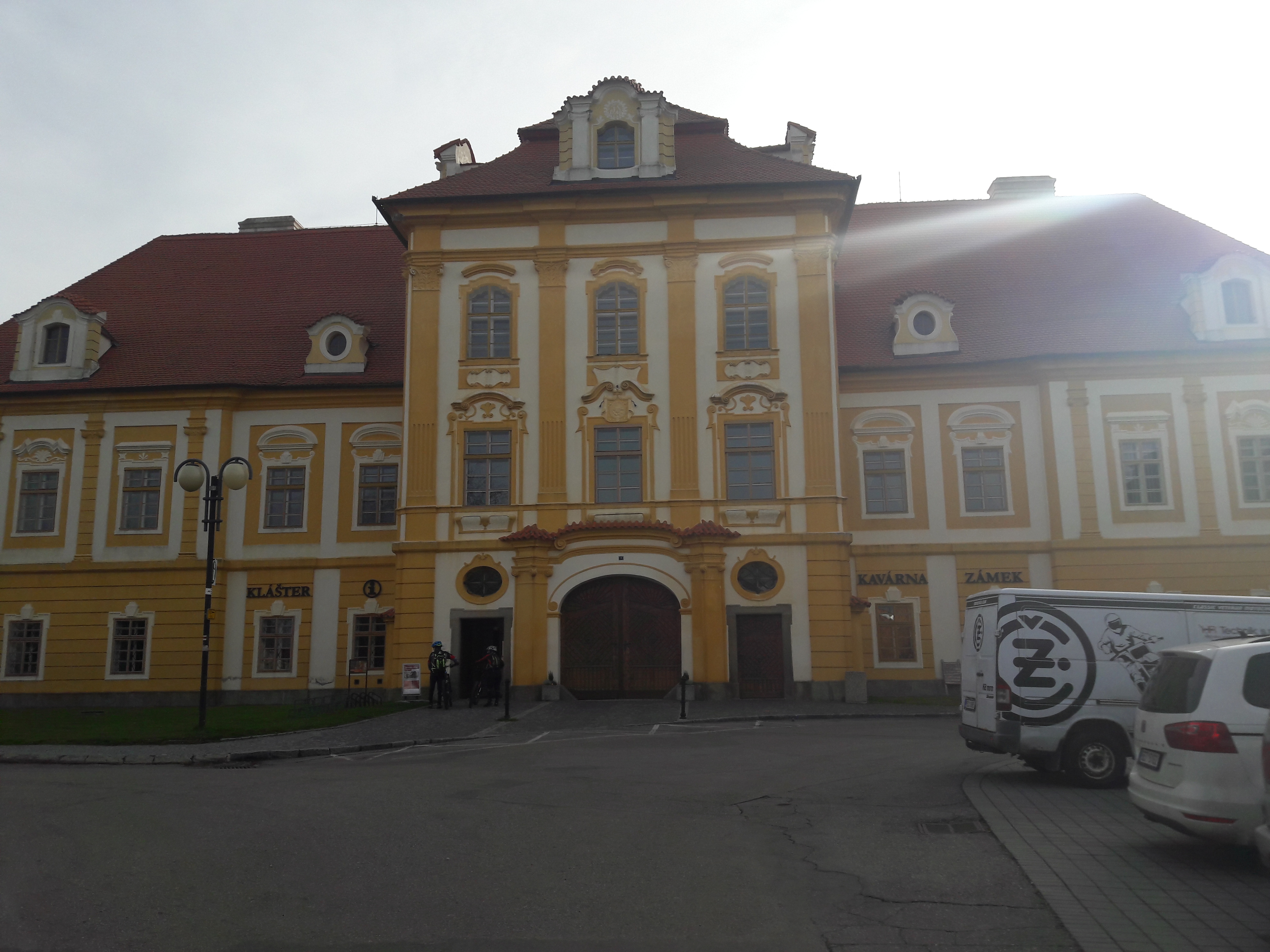 Borovany, klášter